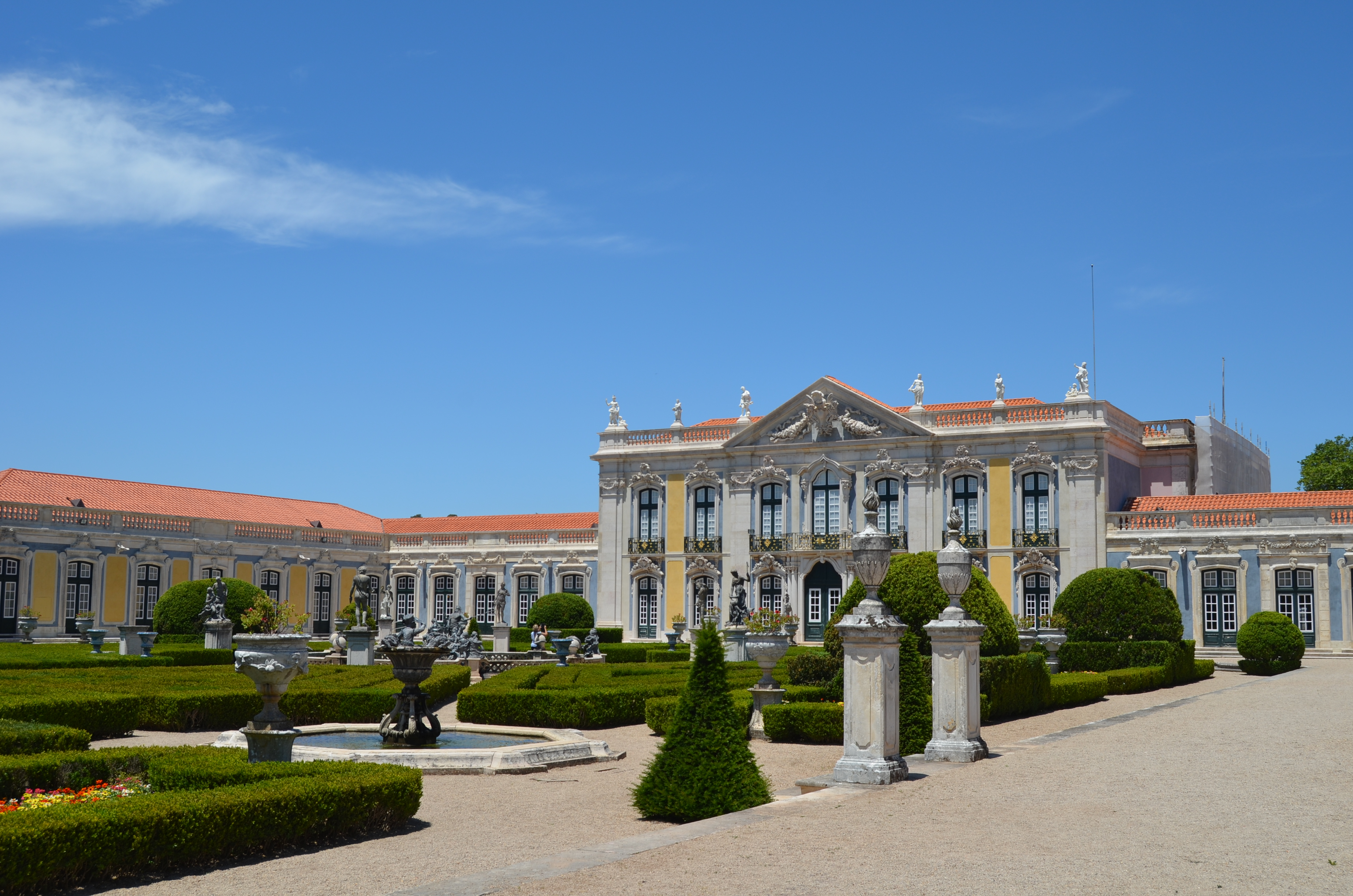 Queluz National Palace, Portugal